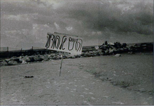 2 Signboards